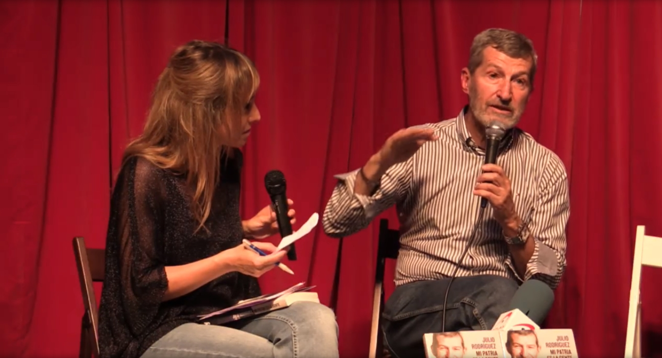 Presentación del libro 'Mi patria es la gente', de Julio Rodríguez.